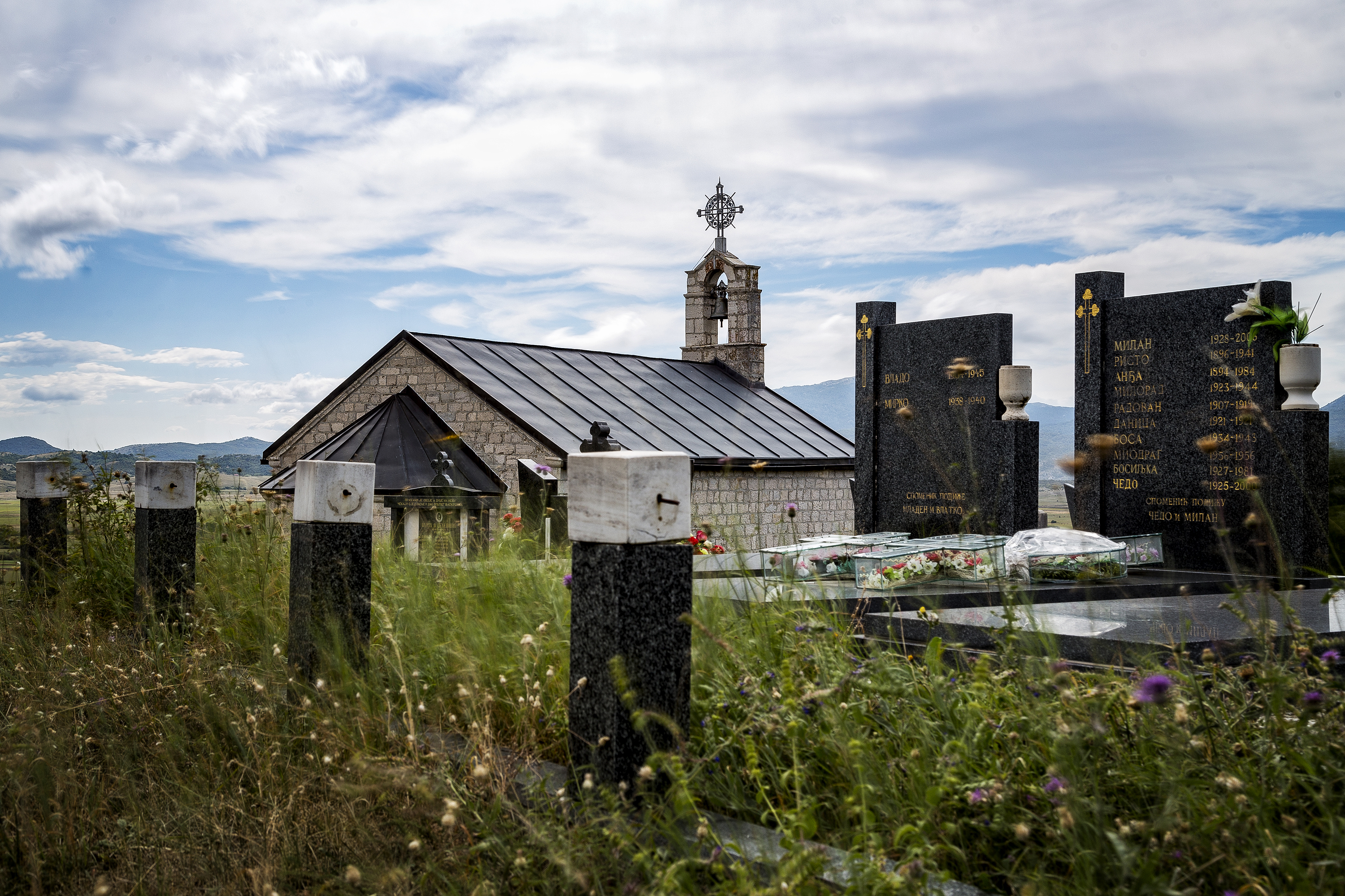 Храм Светог Николаја у селу Михољаче. Обновљен је 1884. што значи да је из ранијег времена. Обновљен је и фрескописан 1999. године.